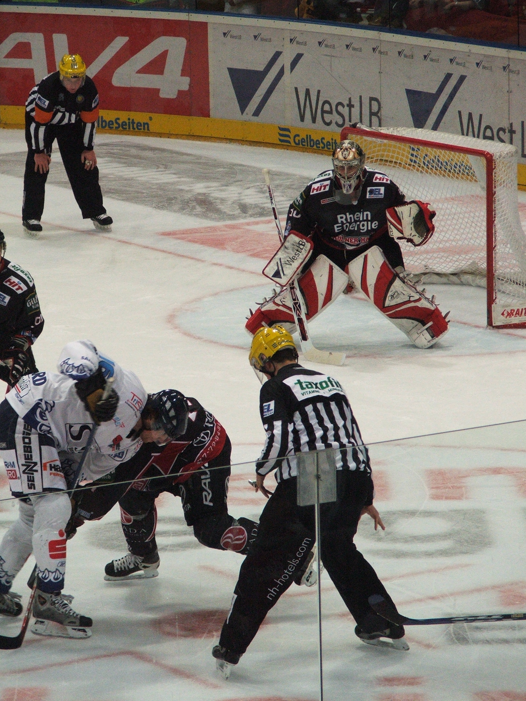 Kölner Haie vs. Straubing Tigers, DEL 2006/07